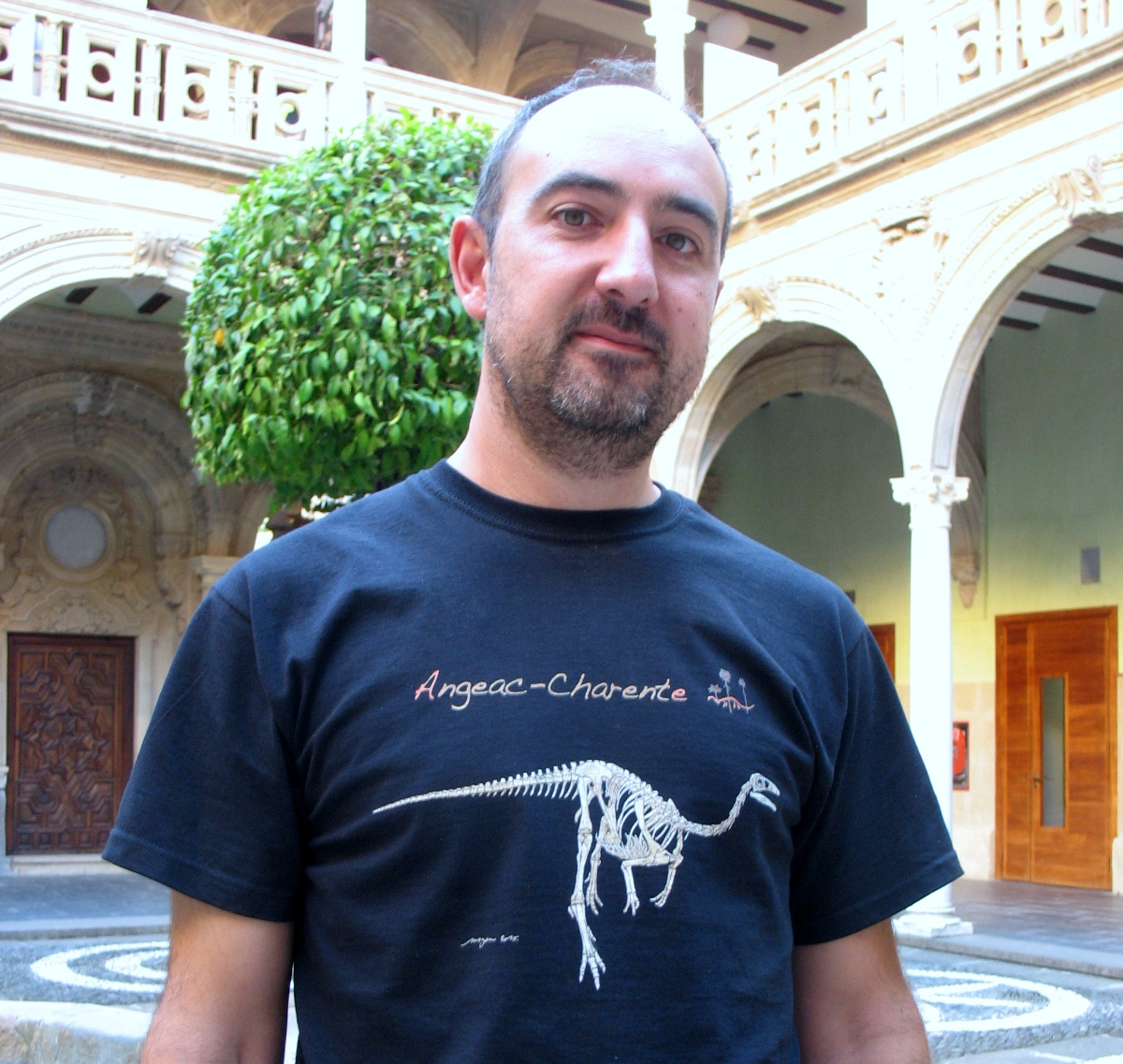 Rafael Royo Torres, paleontólogo español. Paleontólogo de la Fundación Conjunto Paleontológico de Teruel-Dinópolis.